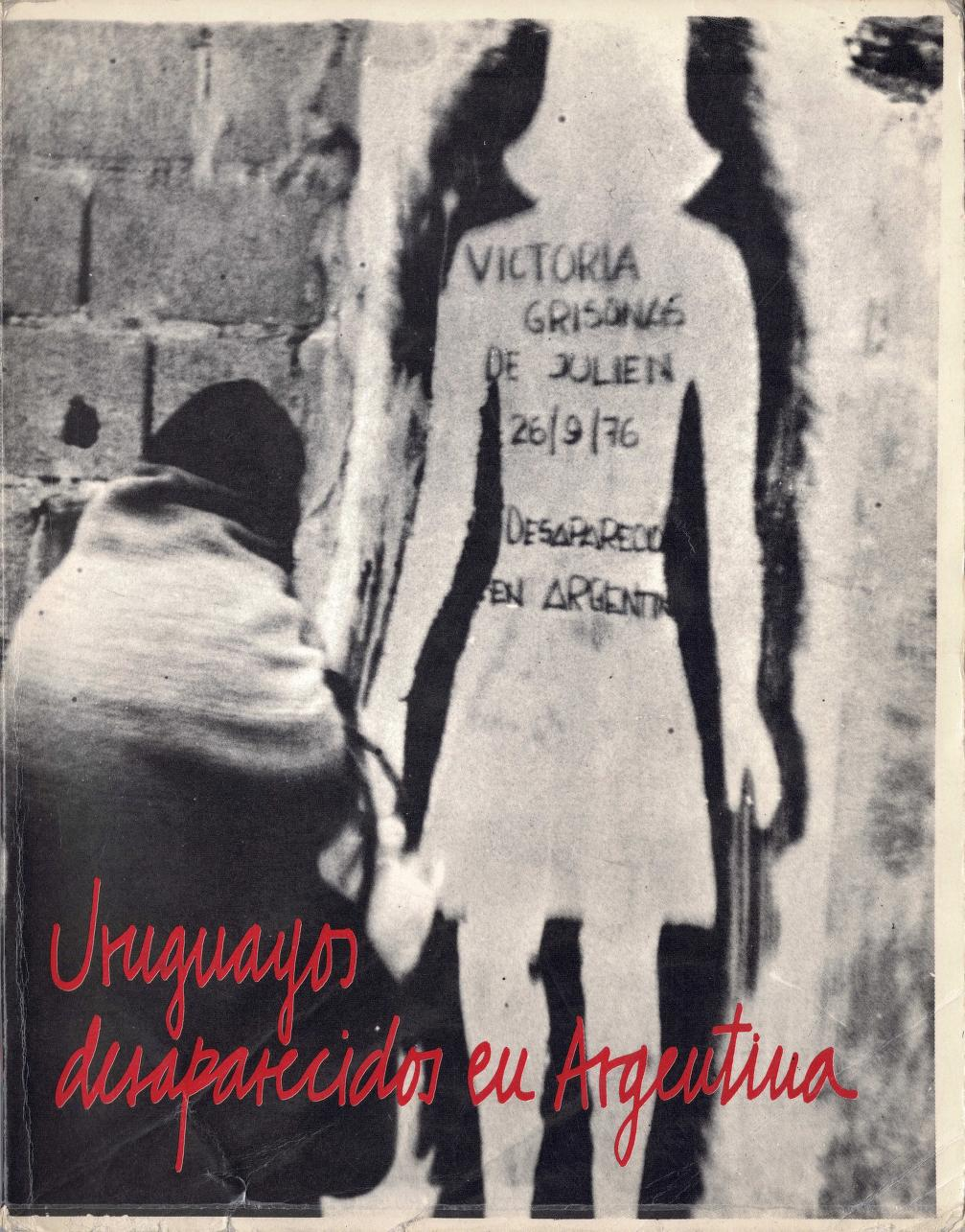 Portada de libros publicados por la organización Madres y familiares de detenidos desaparecidos de Uruguay, licenciados en forma libre para la editatón Wiki DDHH 2018 de Uruguay